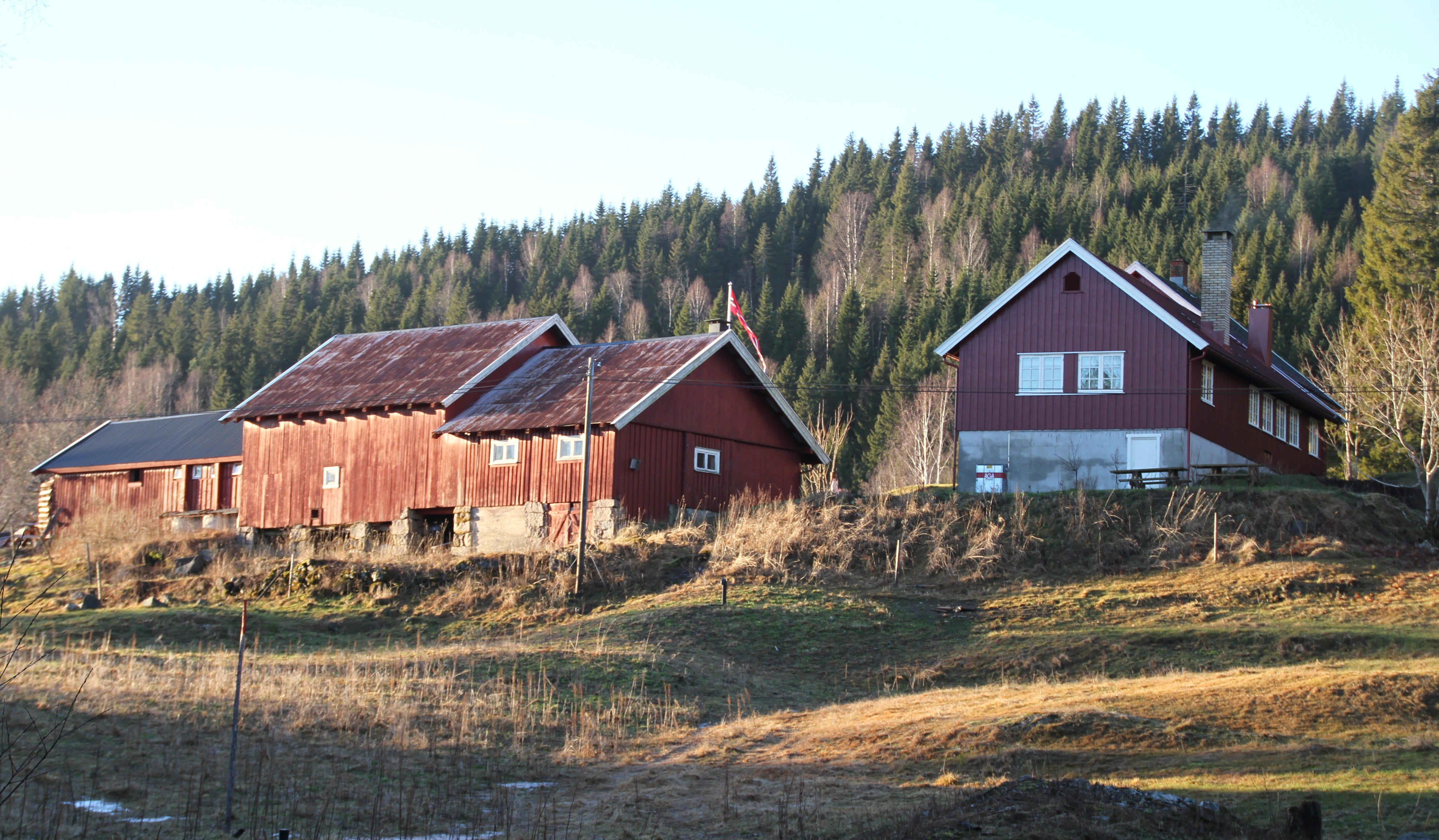 Finnerud Gård er en sportsstue vest i Nordmarka, nær Sørkedalen. Oslo.